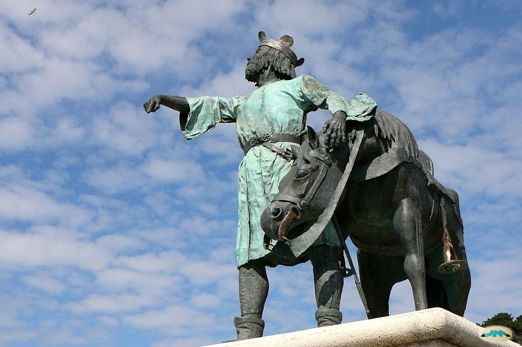 Baiona327